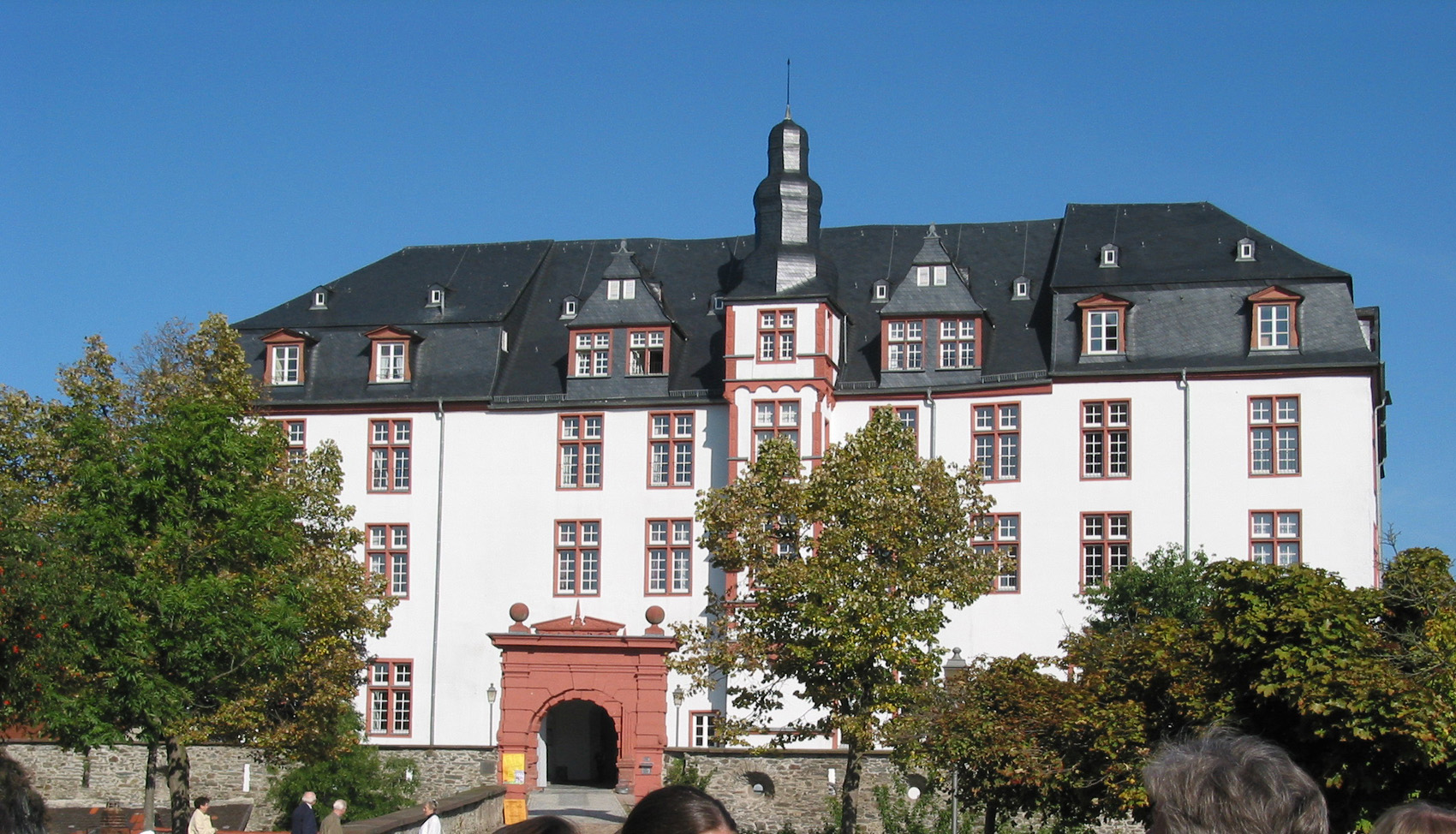 Description: Schloss in Idstein Source: Selbst fotografiert, August 2003 Photographer/Painter: Ralf Ziegler, --RalfZi 22:33, 23 Mar 2005 (UTC)